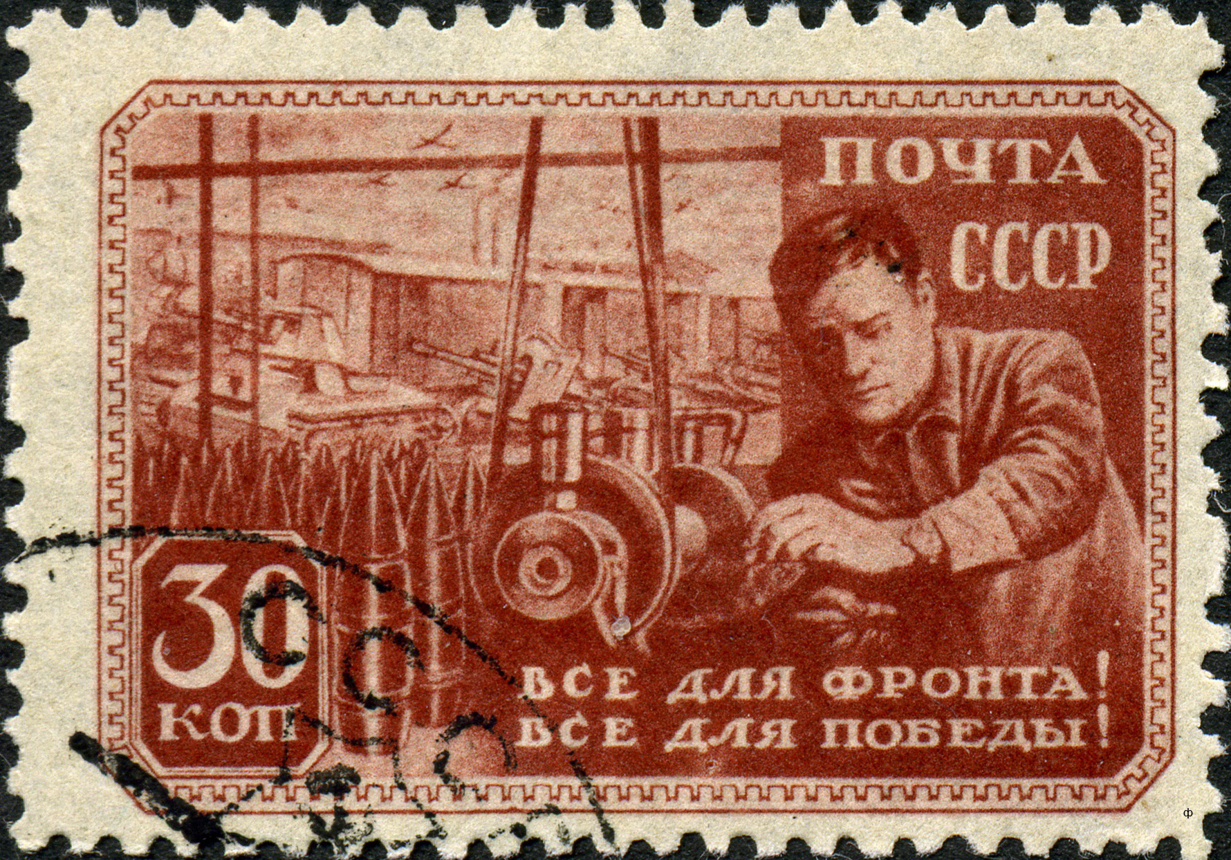 Марка СССР